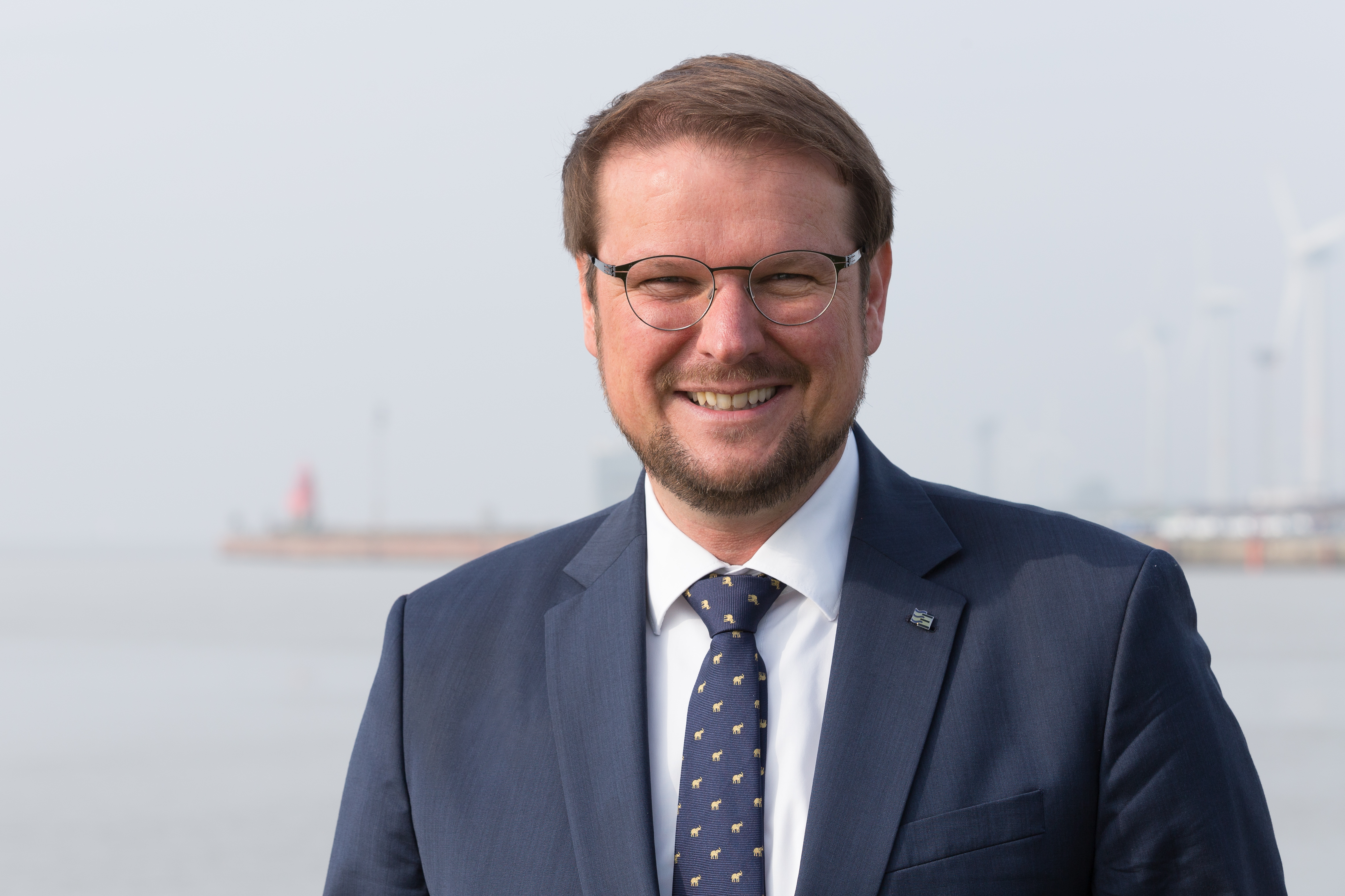 Tim Kruithoff am Emder Außenhafen